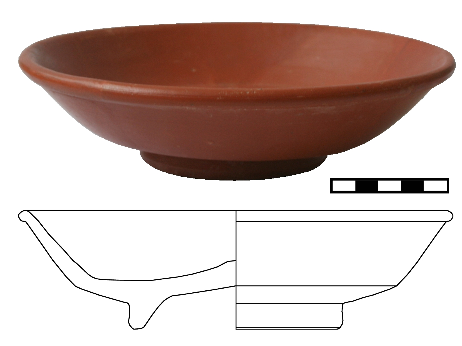 Terra Sigillata-Teller Form Dragendorff 18/31. Fundort: Römische Villa Haselburg.